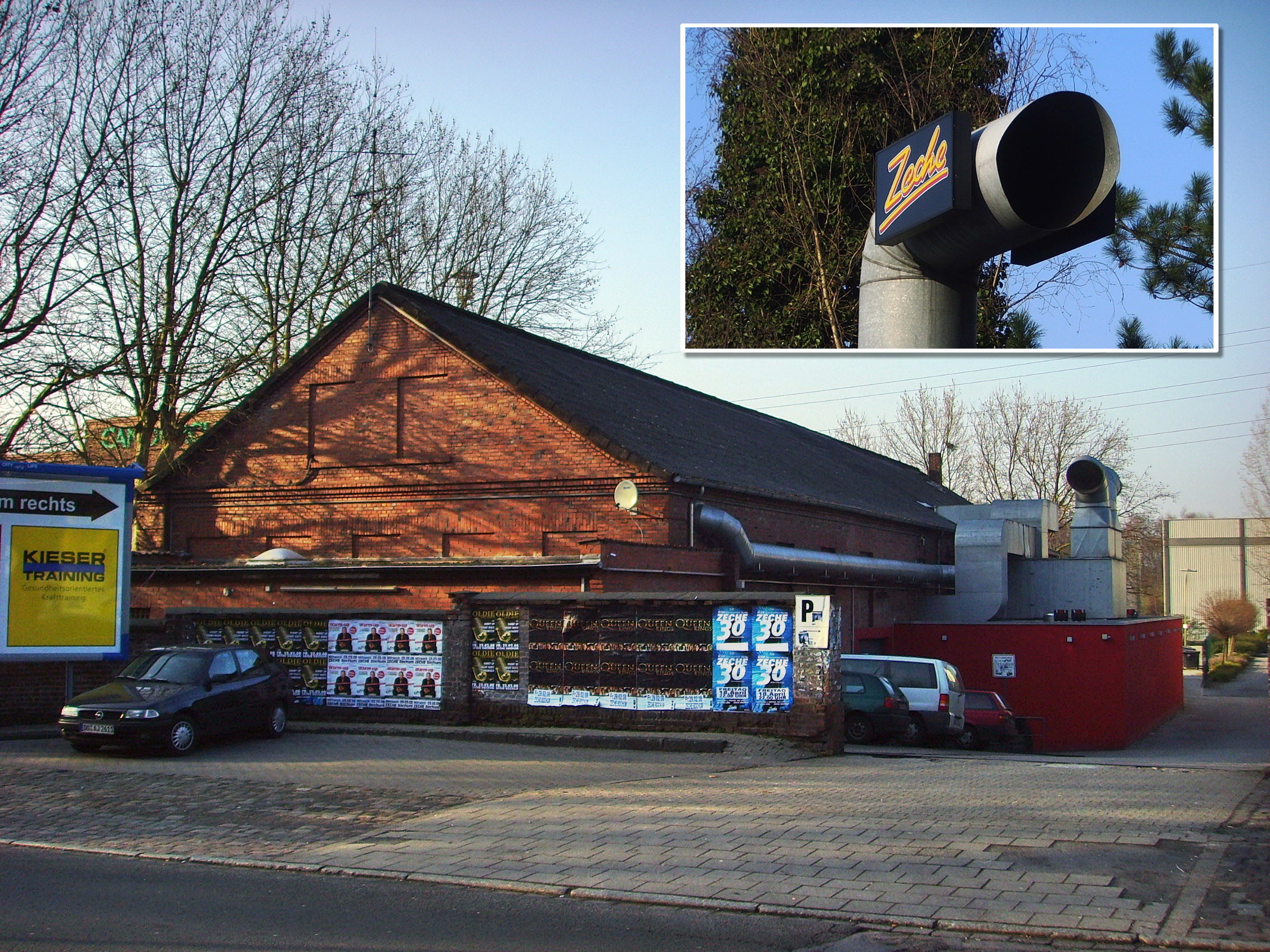 Außenansicht der Diskothek "Zeche Bochum" an der Prinz-Regent-Straße mit einer Einarbeitung des Logos von einem anderen Standpunkt : "Zeche Bochum, a discoteque with Logo Source: own work Date: Feb 2008, Bochum, Germany Author: Maschinenjunge Licence: GFDL, cc-by 3.0